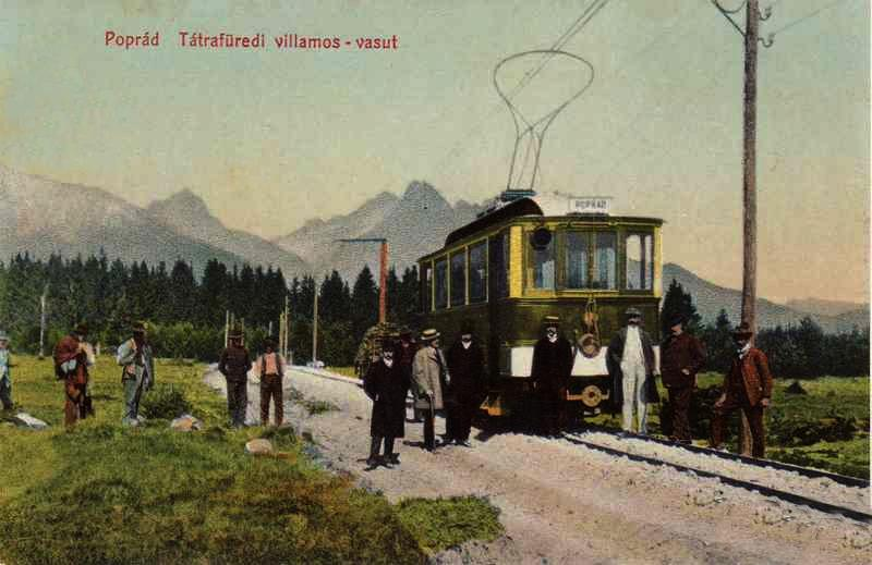 Dobový záber električky z Popradu do Starého Smokovca zo uačiatku 20.storočia